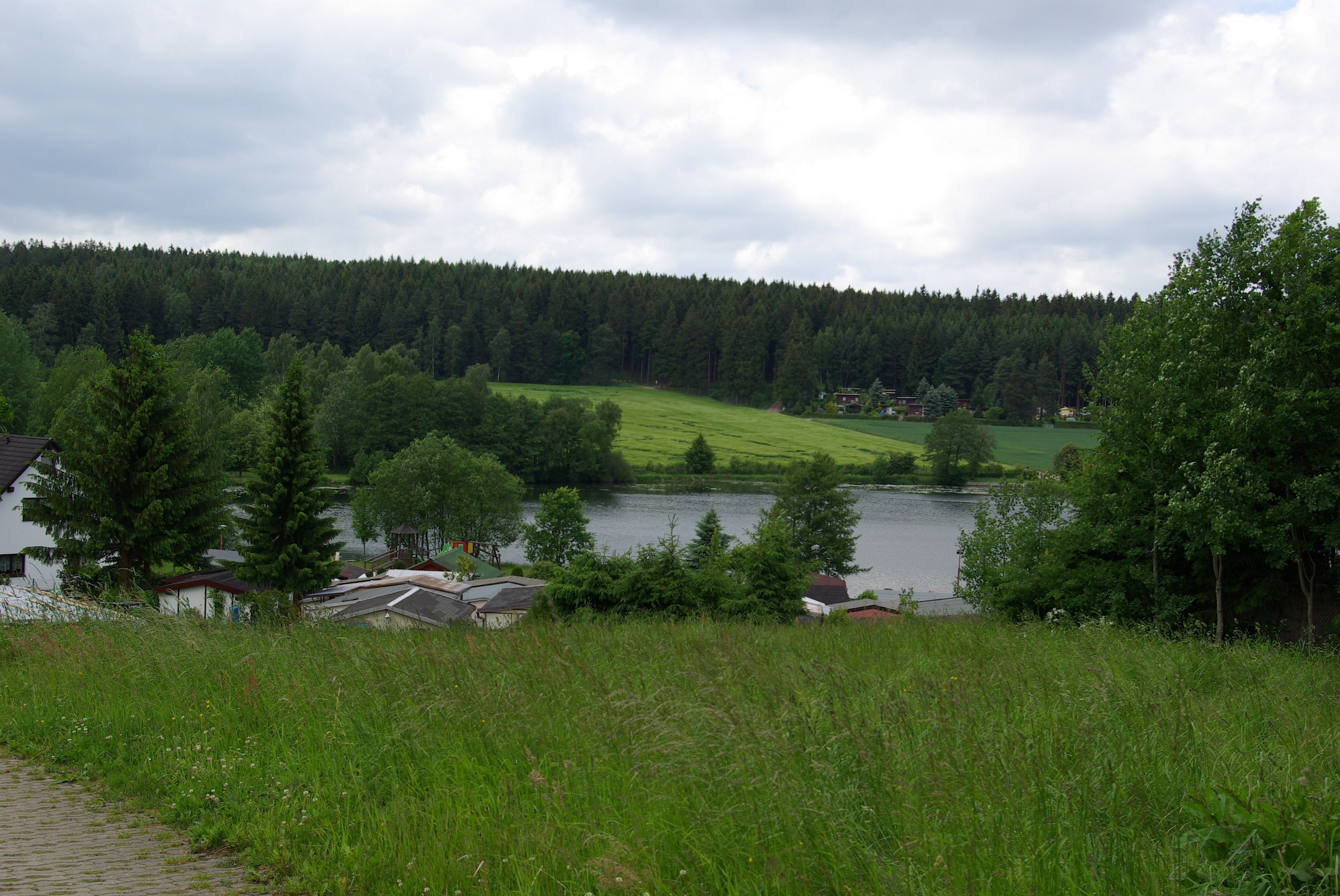 Der Forstteich mit Campingplatz